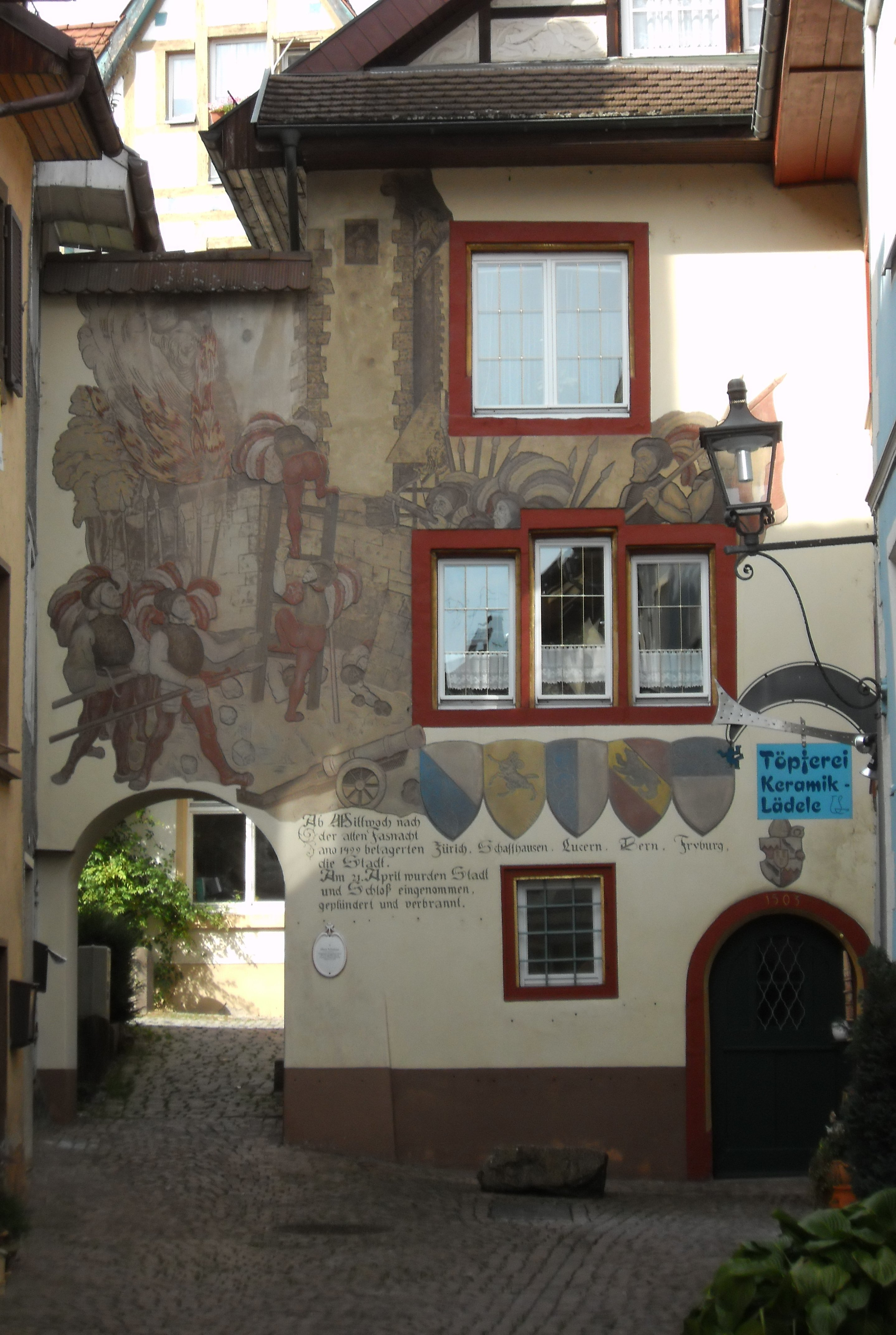 Scraffito Belagerung der Stadt Tiengen